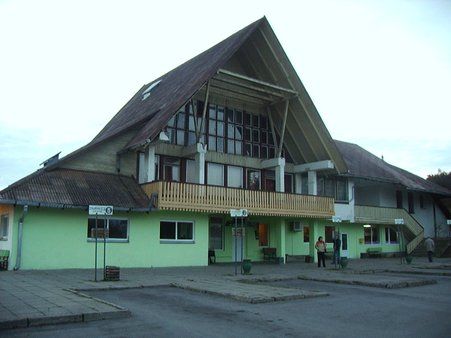 Kryžkalnis. Fotografavo Malakasosas